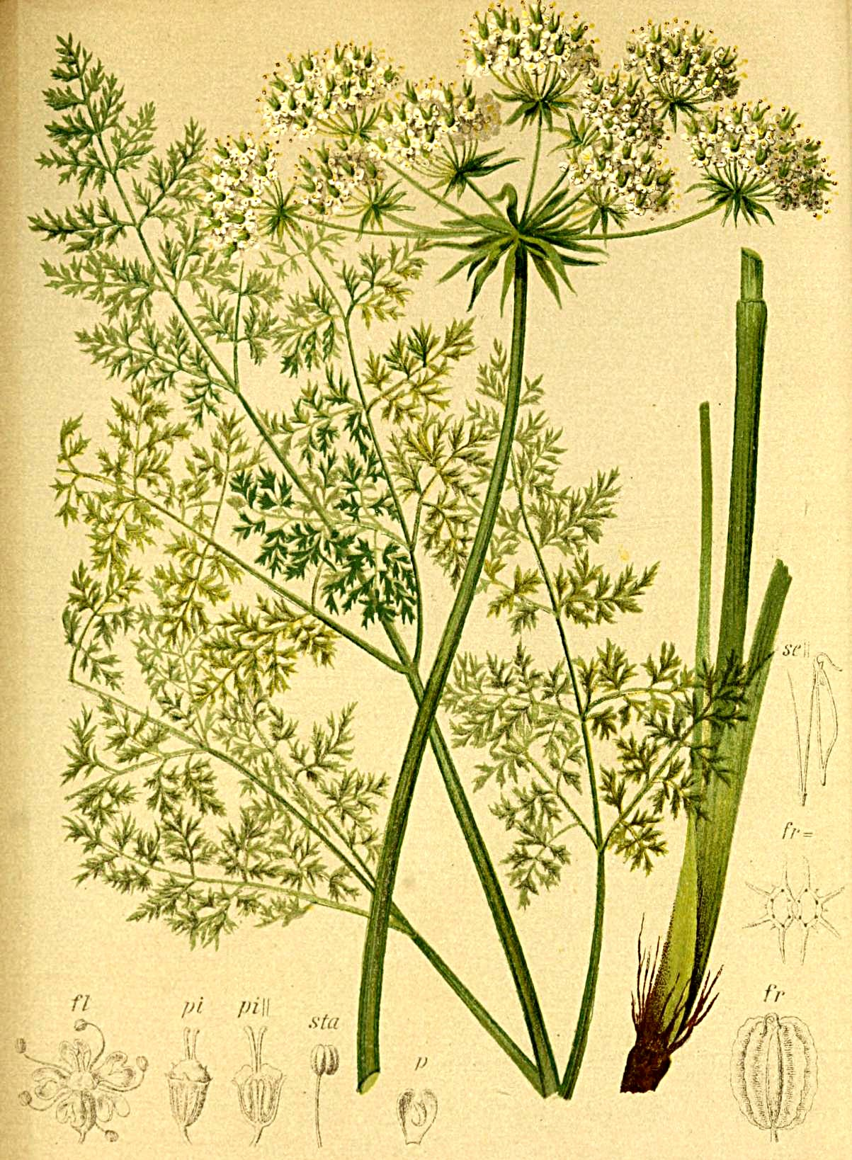 Laserpitium hirsutum (Laserpitium halleri)